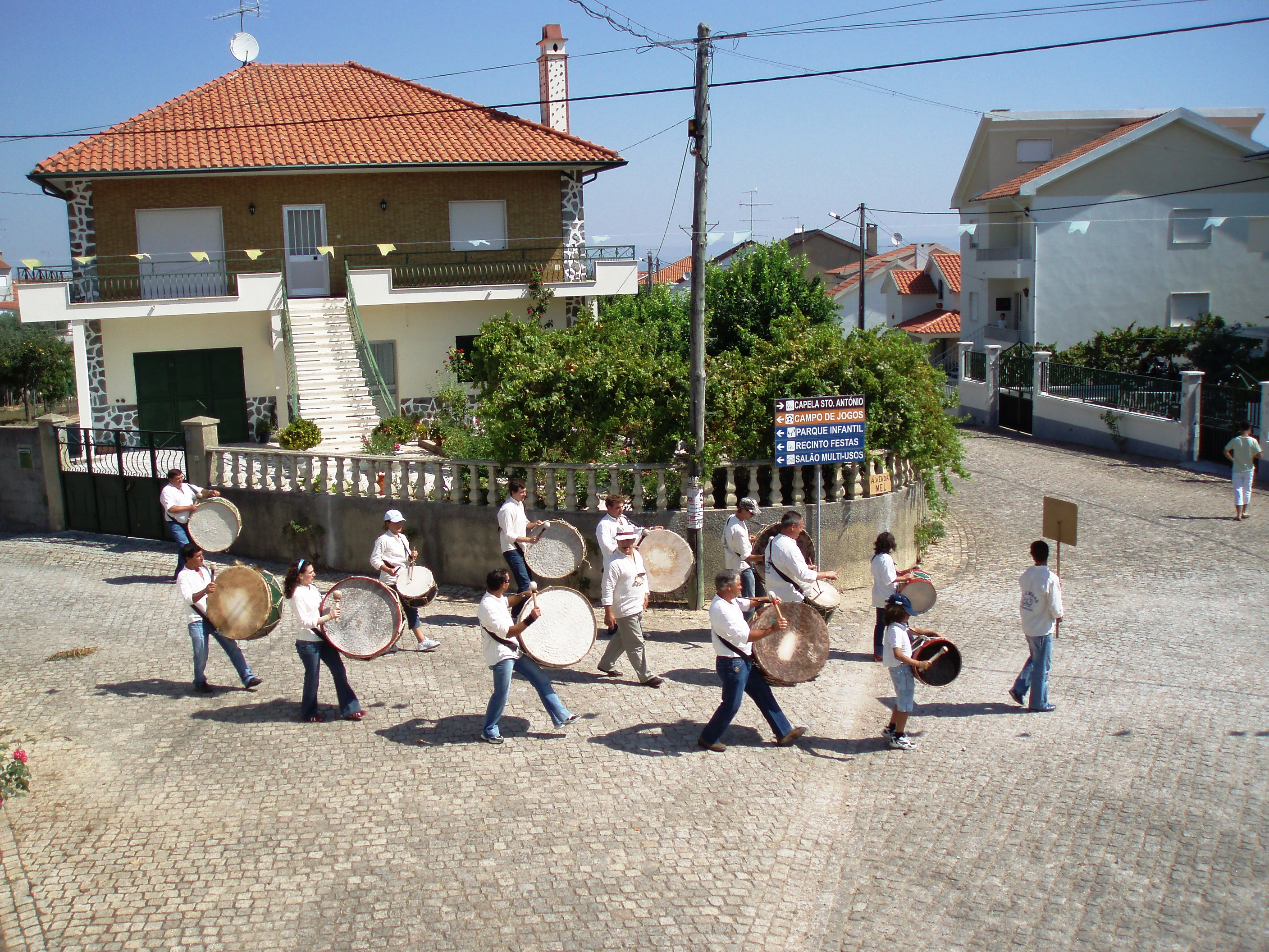 Arruada dos Zabumbas, bombos de Alpedrinha